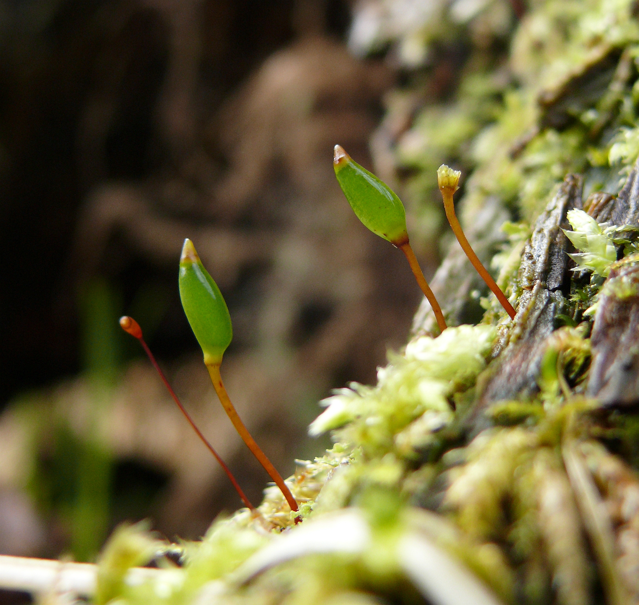 Buxbaumia viridis, Schwäbisch-Fränkische Waldberge, Germany